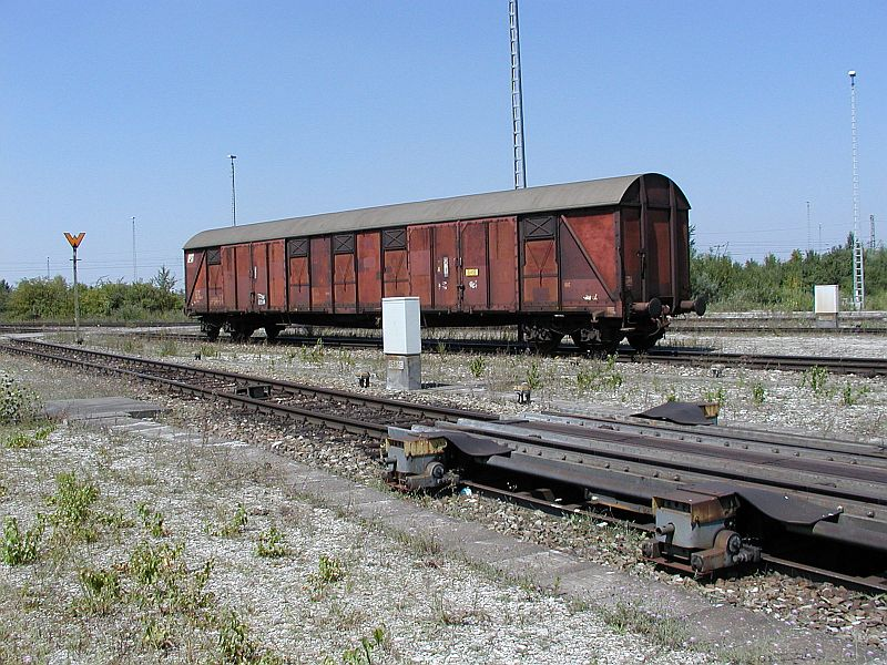 Ablaufbetrieb in München Nord Rangierbahnhof